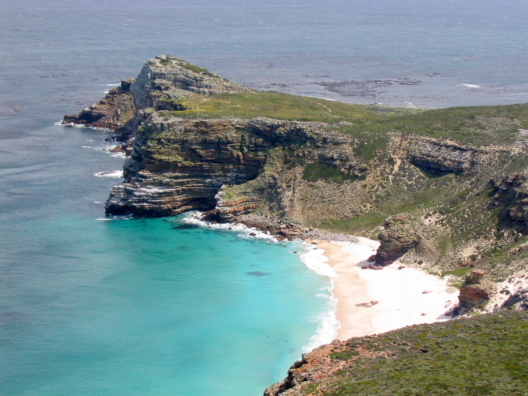 Blick auf das Kap Der Guten Hoffnung (von Cape Point aus)